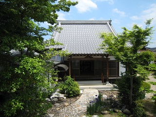 桃源寺 本堂